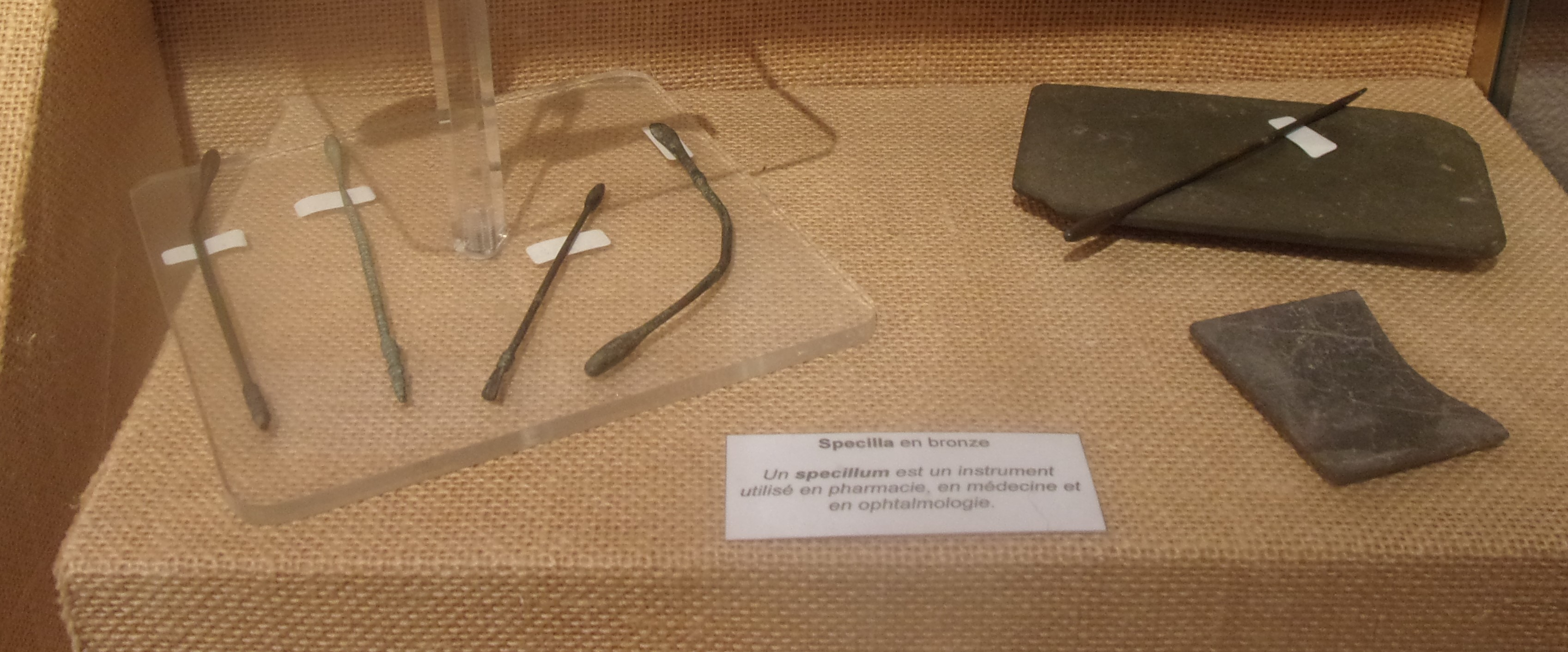 Specilla (instruments chirurgicaux) retrouvés à Pouillé